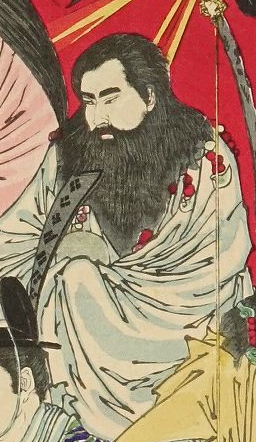 Ninigi, wnuk bogini słońca Amaterasu autorstwa Toyohara Chikanobu